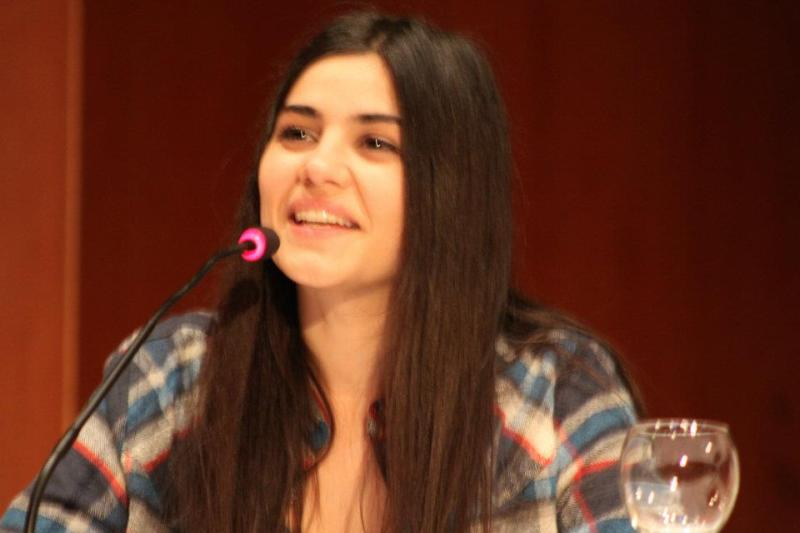 Zeynep Çamcı'nın söyleşiden fotoğrafı